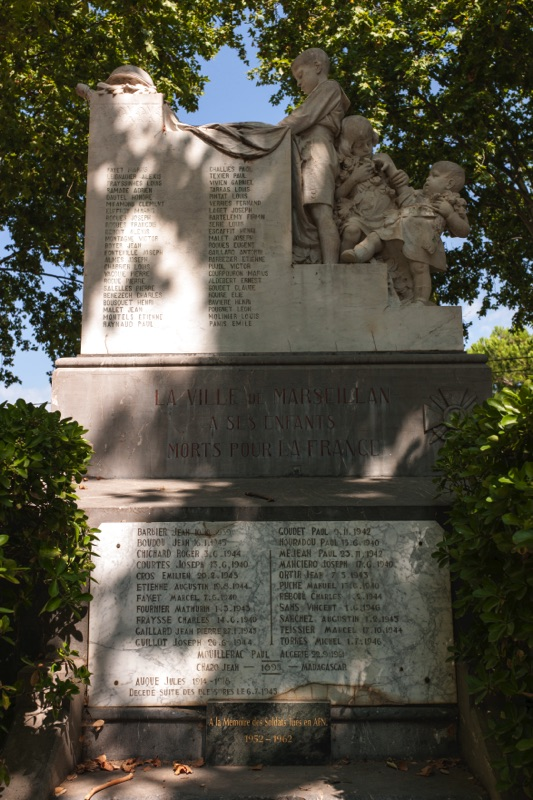 Monument aux morts - Archives départementales de l’Hérault - FRAD034-2458W-Marseillan-00002